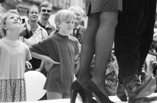 Kindheit